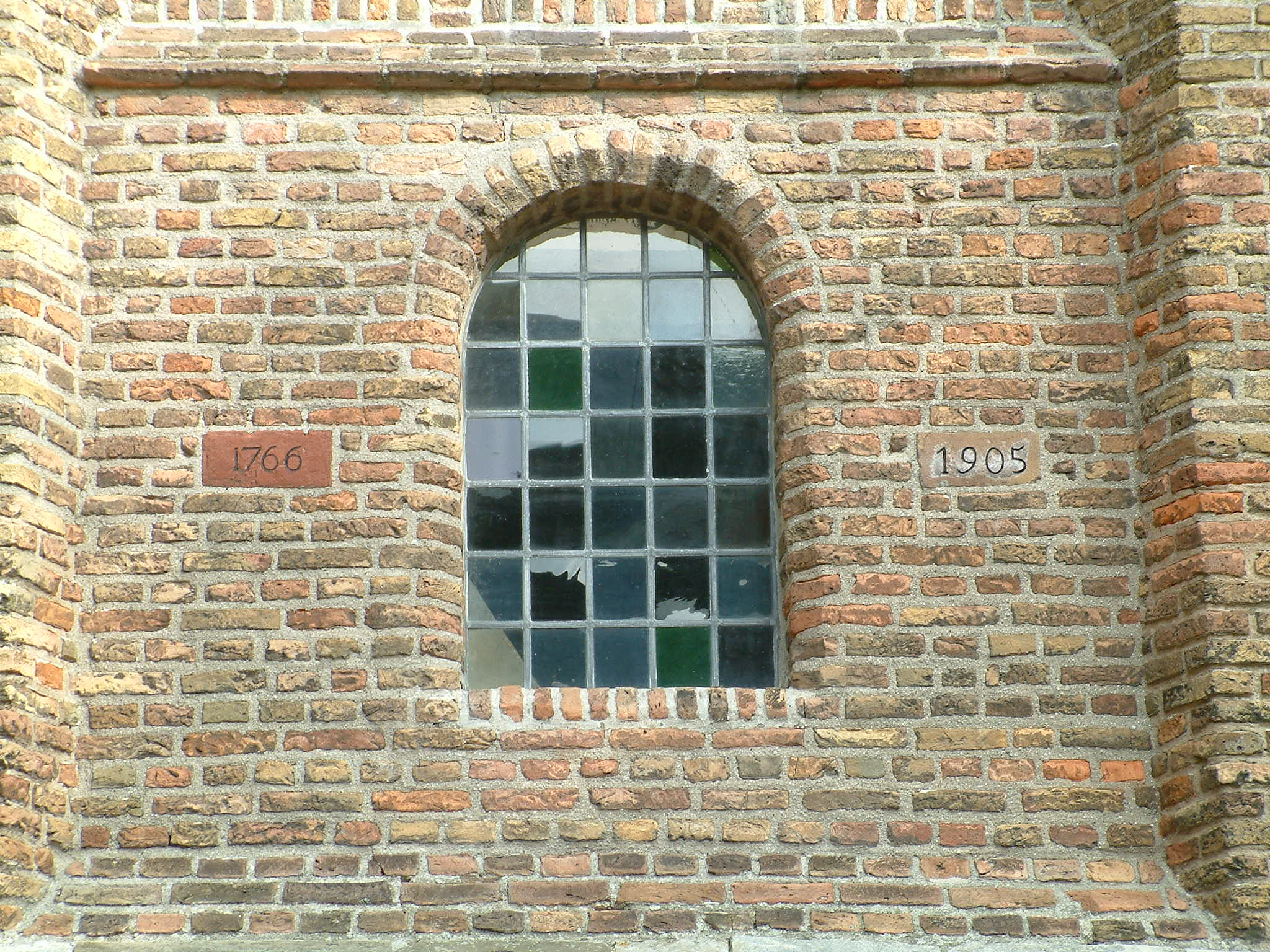 Hervormde kerk van Rhoon